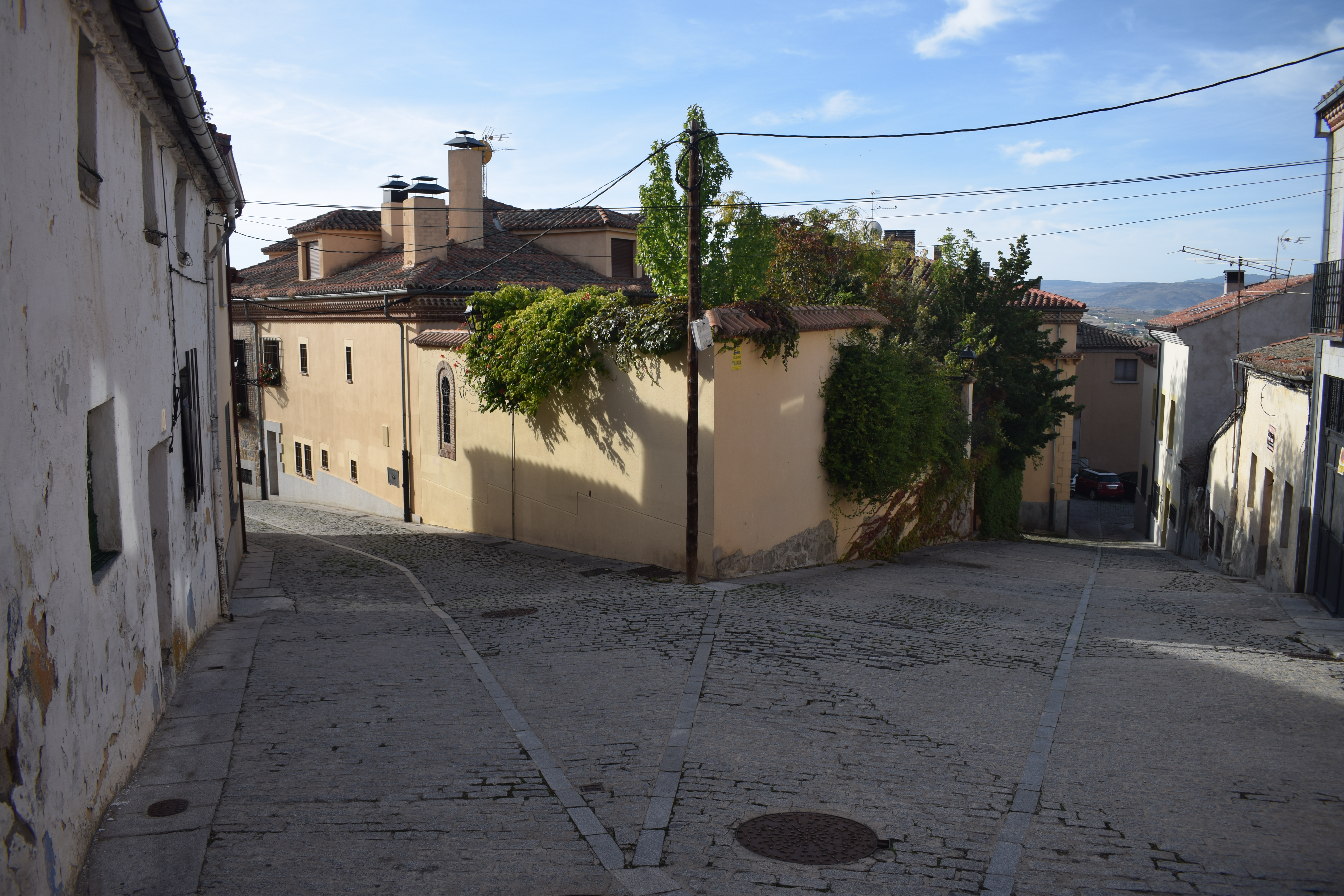 Morería castellana reformada pero conservando el trazado y los muros originales. Apréciese el arco de herradura adoptado por los andaluzis de los visigodos